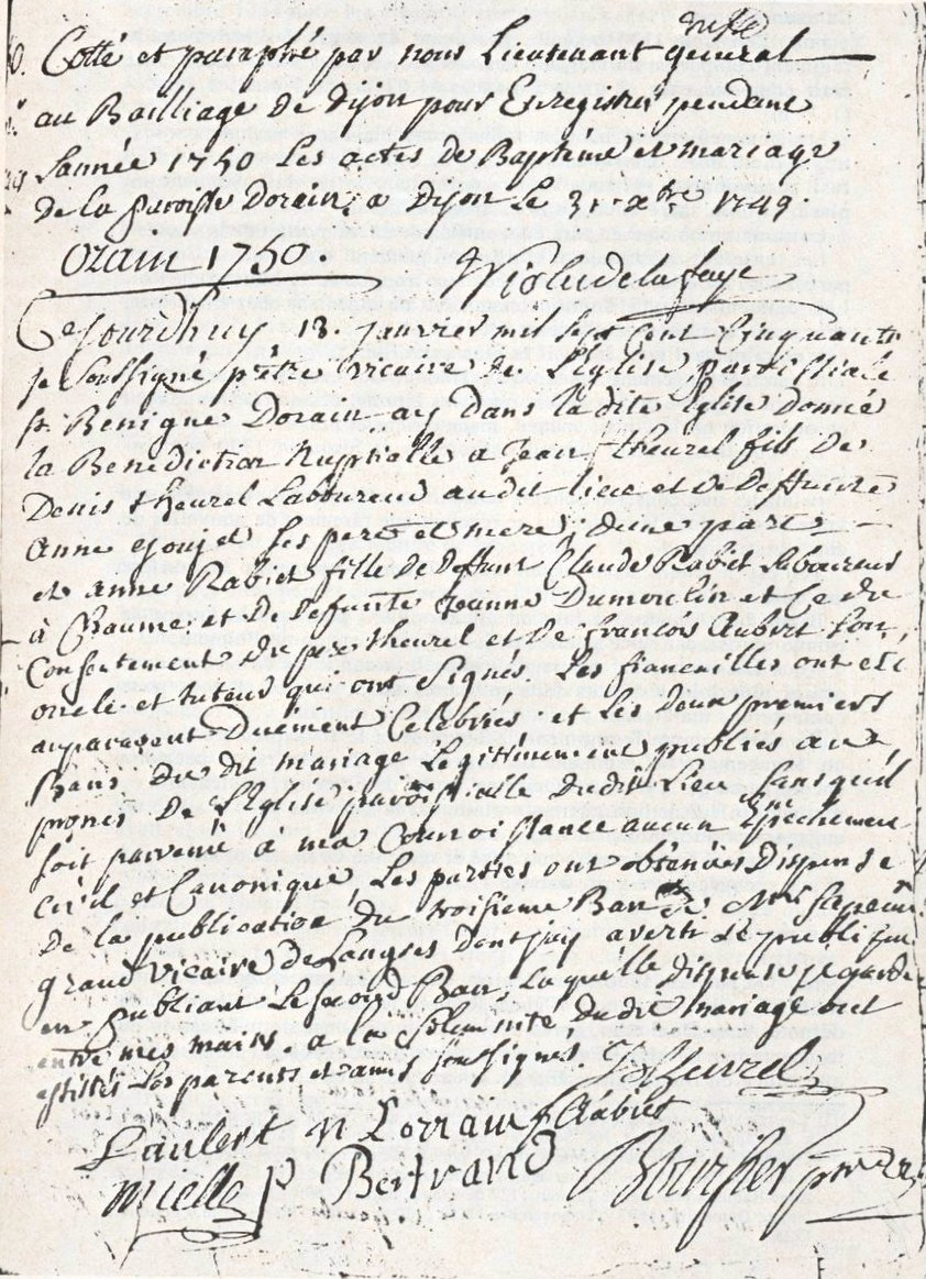 Acte de mariage en date du 13 janvier 1750 de Jean Theurel et Anne Rabiet